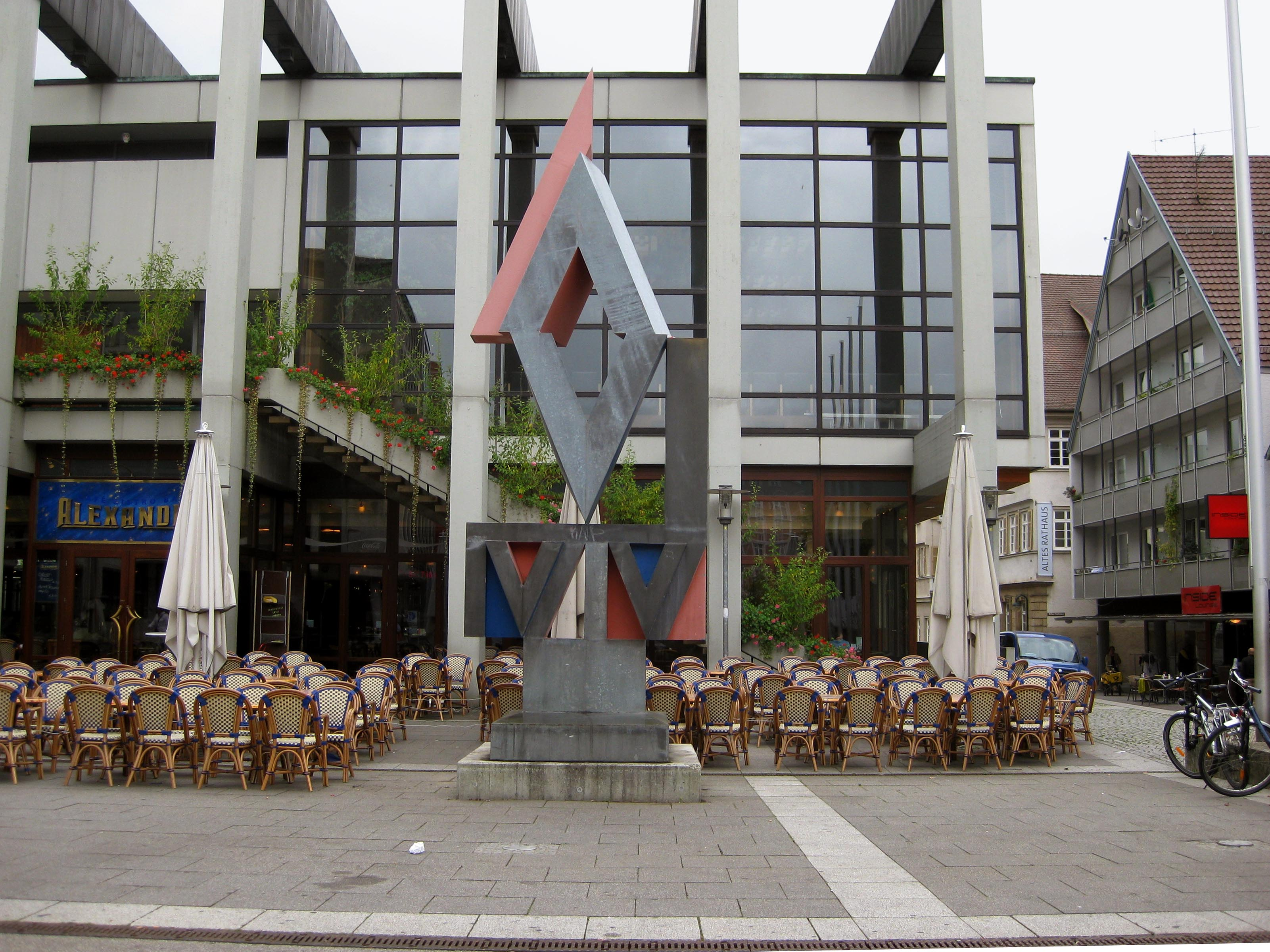 Otto Herbert Hajek, Stadtzeichen 1972/86, Platz vor dem Rathaus, Reutlingen, Baden-Würrtemberg, Deutschland